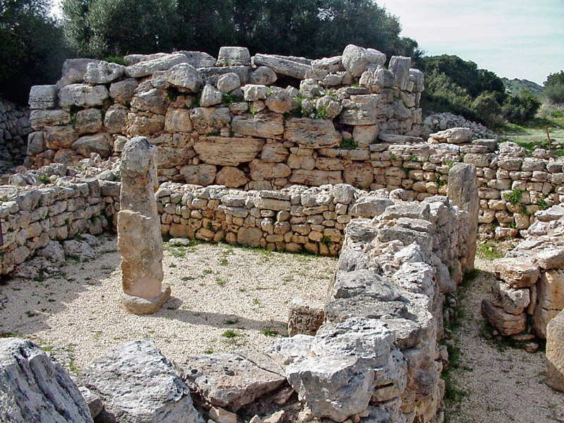 Hospitalet Vell - Quadrangular Talayot.